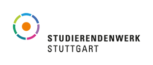 Deitsch: Studierendenwerk Stuttgart AöR Logo Logo - 200px